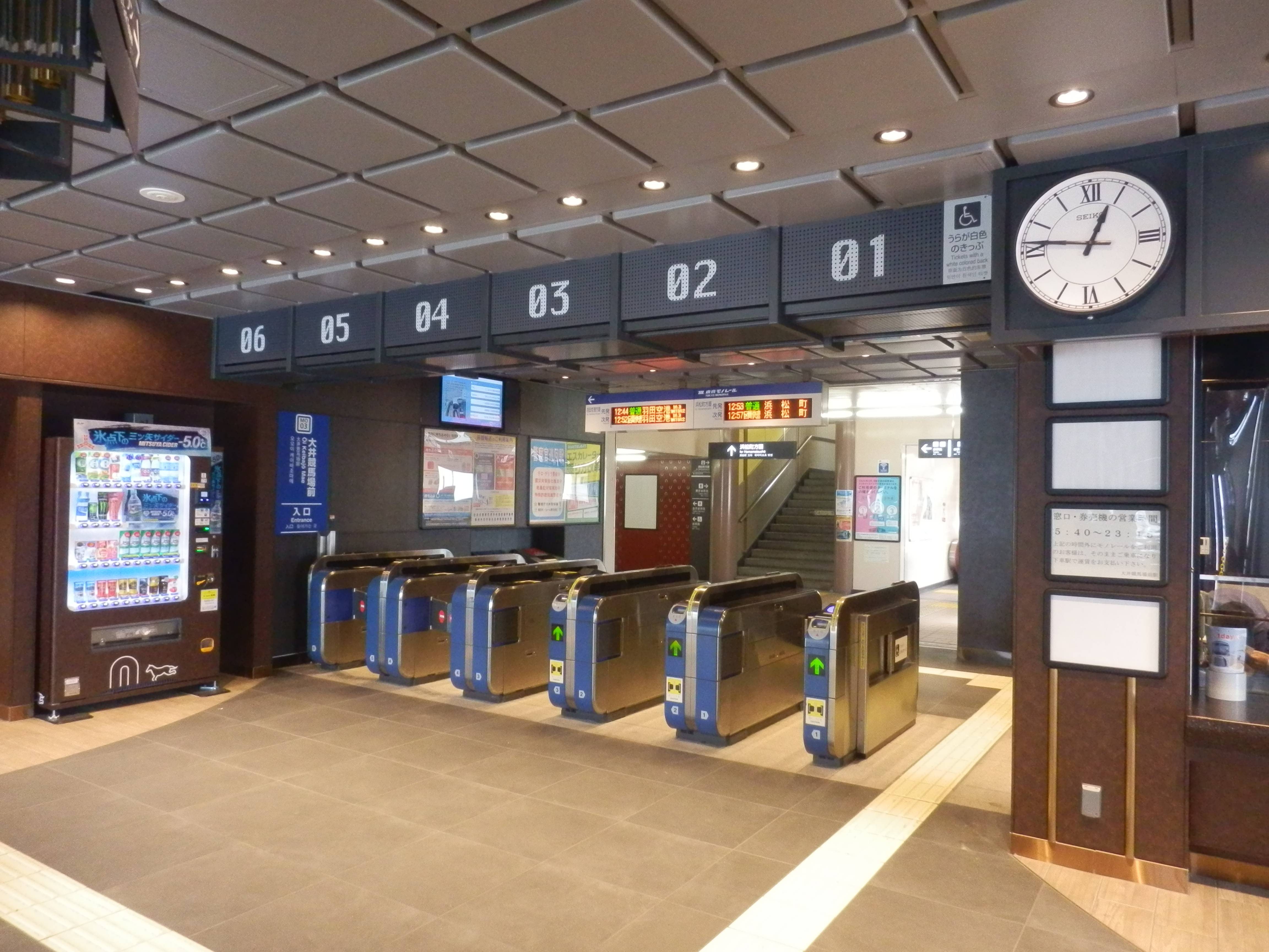 大井競馬場前駅改札